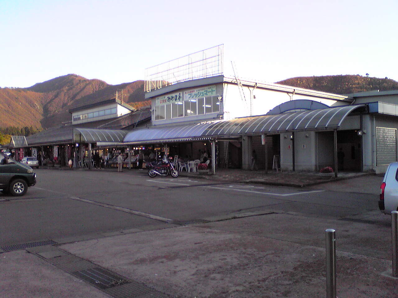 Miyuki no sato, Yunotani, Roadside Station, Niigata, Japan.